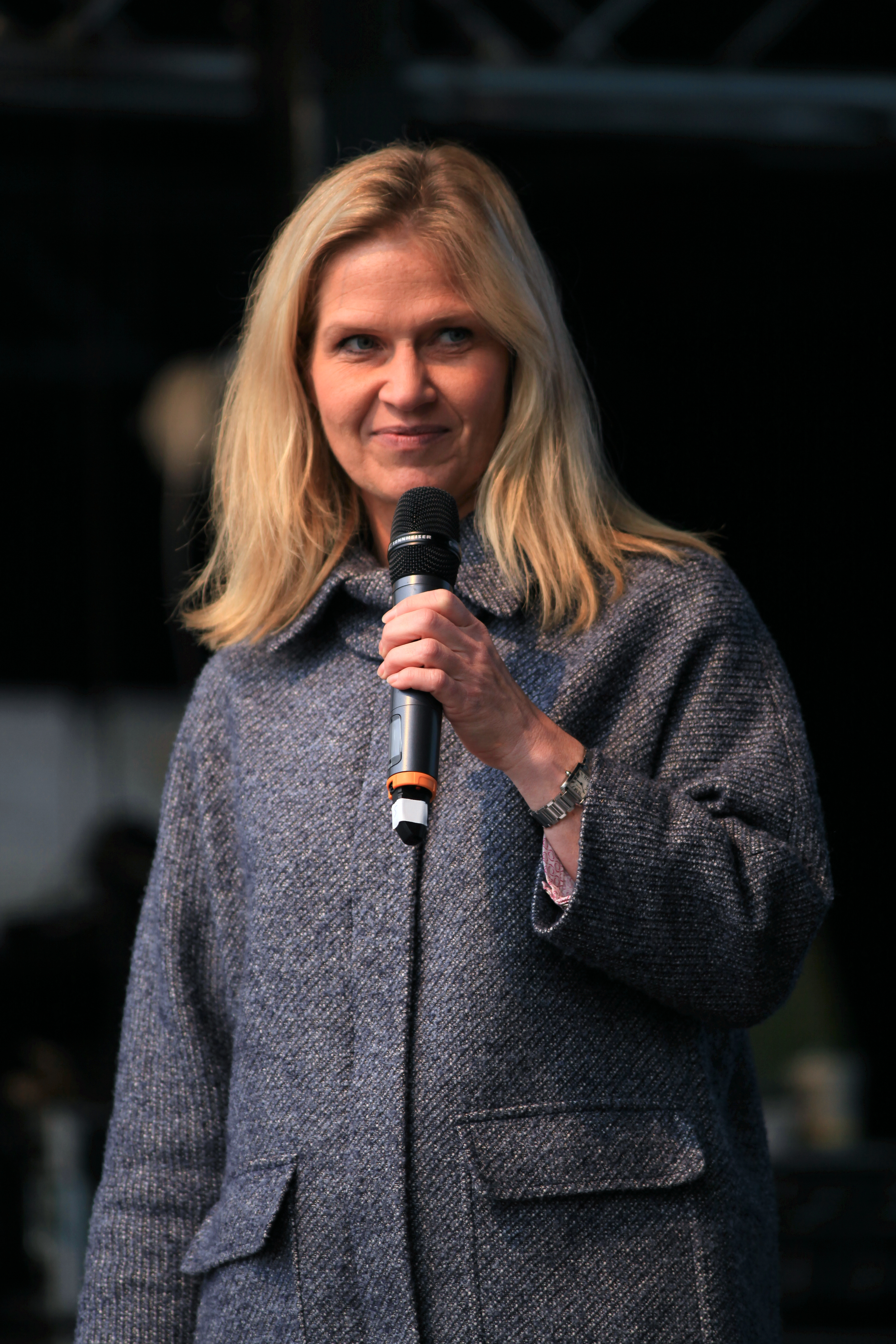 Kerstin von der Linden bei Ein Tag Live in Velbert, Liveshow des WDR am 24.10.2015 auf dem Rathausplatz in Velbert.